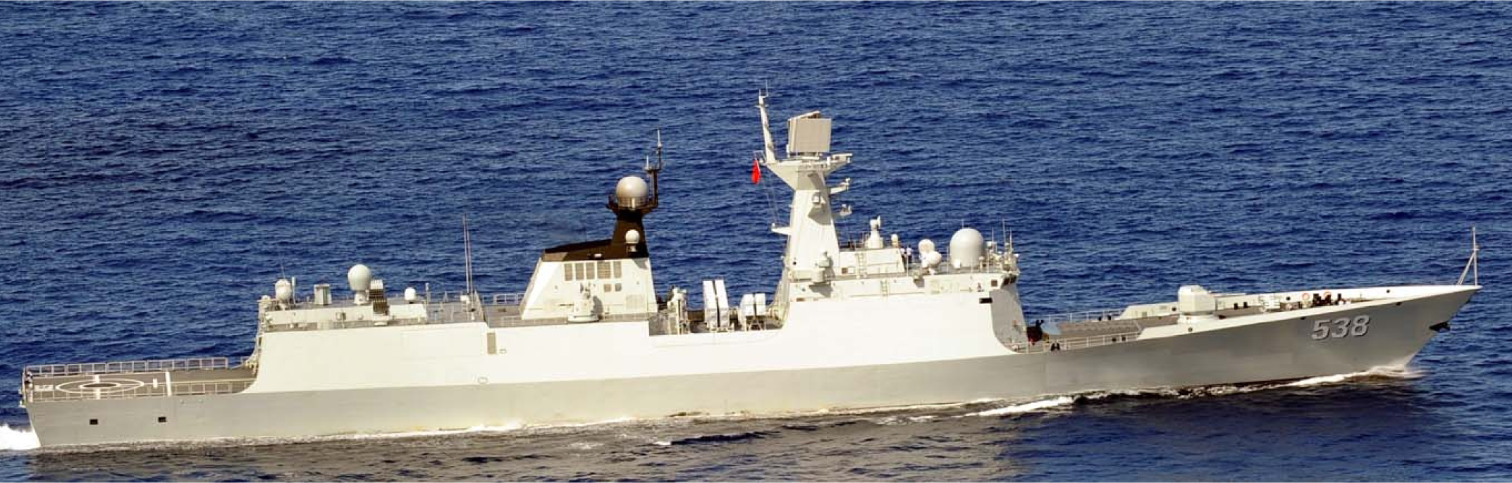 ７月２５日（木）午後７時頃、海上自衛隊第１４護衛隊「まつゆき」（舞鶴）及び第５航空群所属「Ｐ－３Ｃ」（那覇）が、宮古島の北東約１００ｋｍの海域を太平洋から東シナ海に向けて北西進する中国海軍ルージョウ級ミサイル駆逐艦２隻、ジャンカイⅡ級フリゲート２隻及びフーチン級補給艦１隻の合計５隻を確認した。 なお、当該艦艇は、７月２日（火）、対馬海峡を北上、７月１４日（日）、宗谷海峡を東航した後、７月１８日（木）、聟島（東京都小笠原村）の北海域を南西進したことを確認している。その後、聟島西約２７０ｋｍの海域で陣形運動を、沖ノ鳥島北約４００ｋｍの海域で洋上補給を実施しているのを確認した。